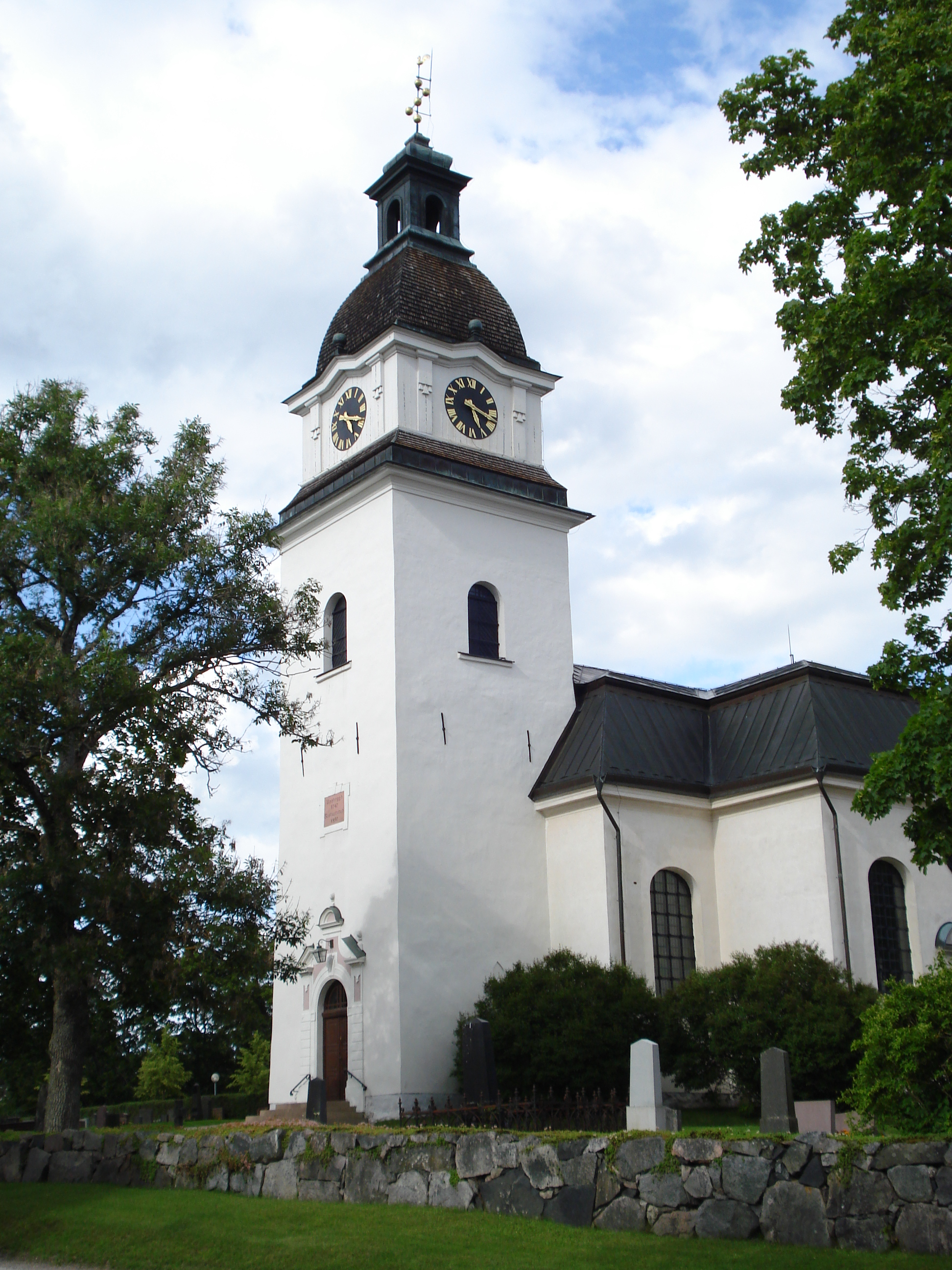 Götlunda kyrka, Arboga kommun